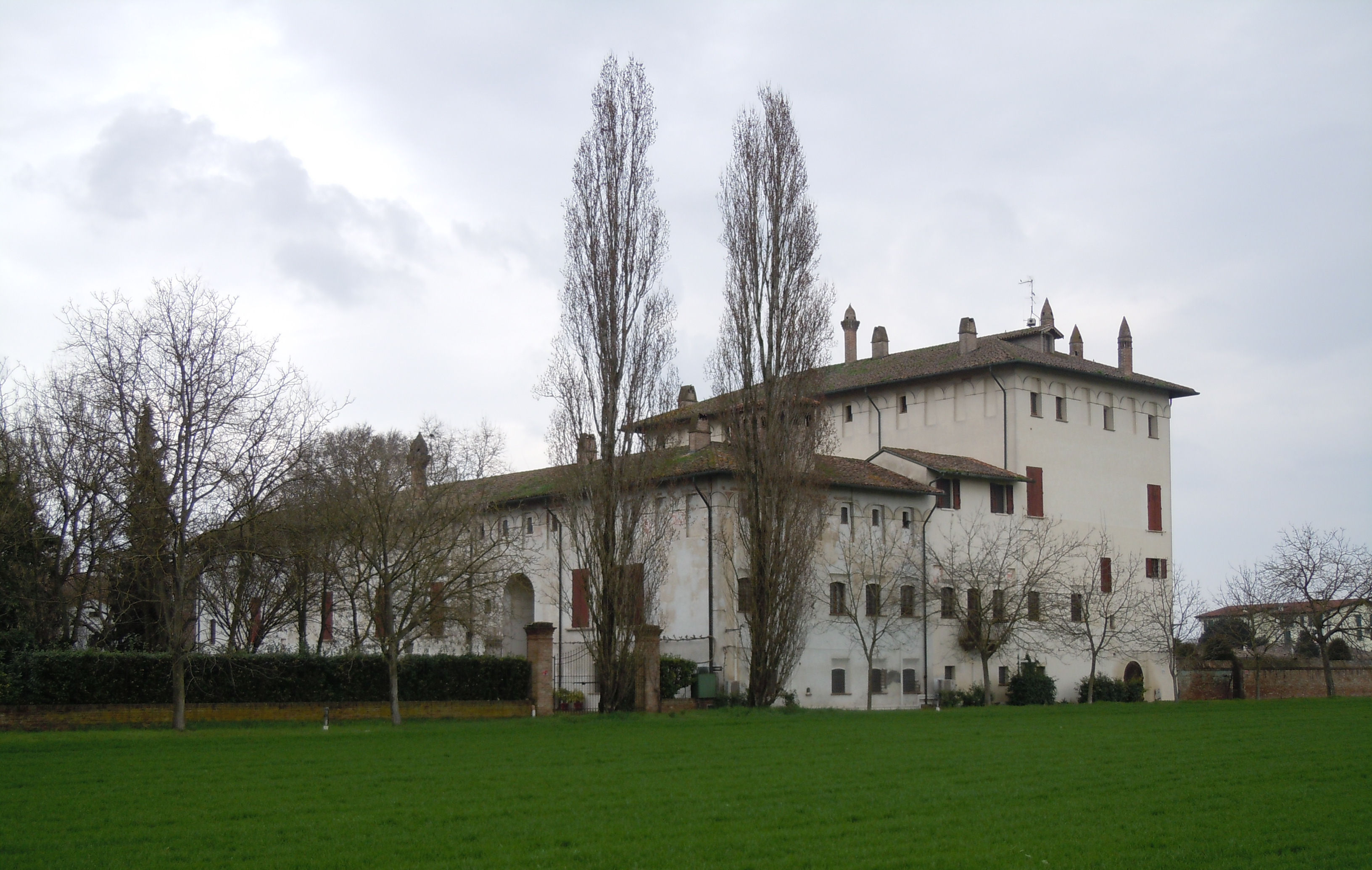 Motteggiana, Corte Ghirardina, costruita da Luca Fancelli.